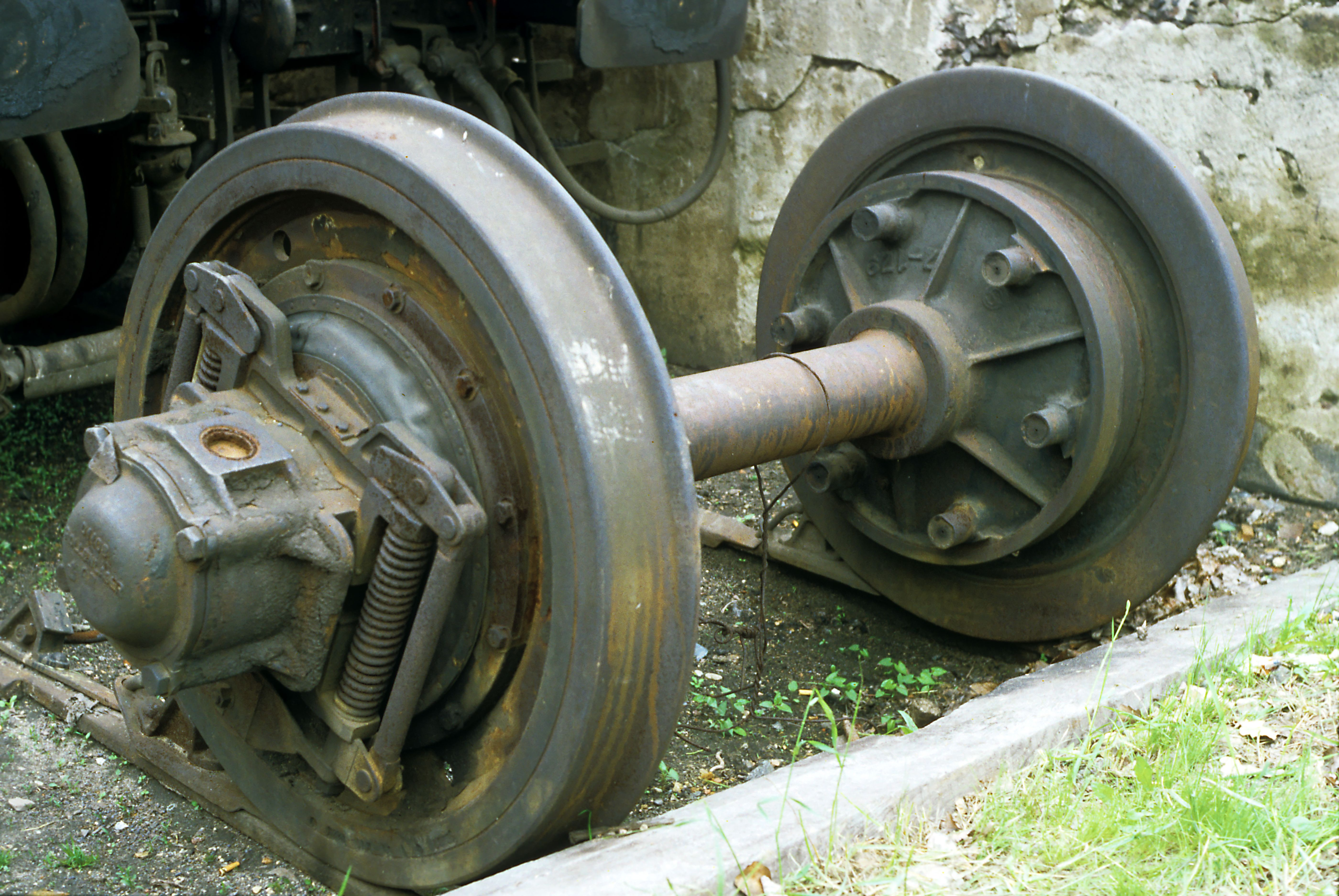 letzter erhaltener Spurwechselradsatz DR III für 1435 und 1520 mm Spurweite. Entwickelt 1957, regulär eingesetzt im Erzverkehr von 1962 bis September 1967.Dresdener Dampflokfest 1996